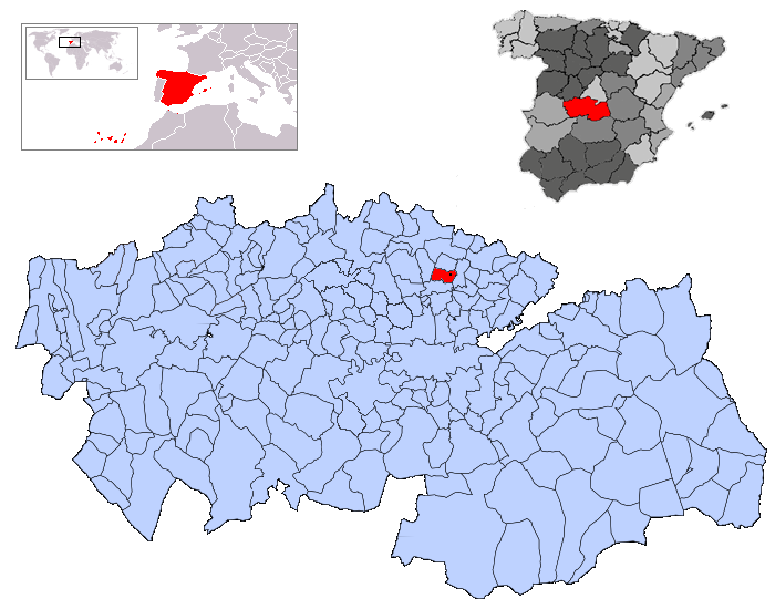 Lominchar en la provincia de Toledo